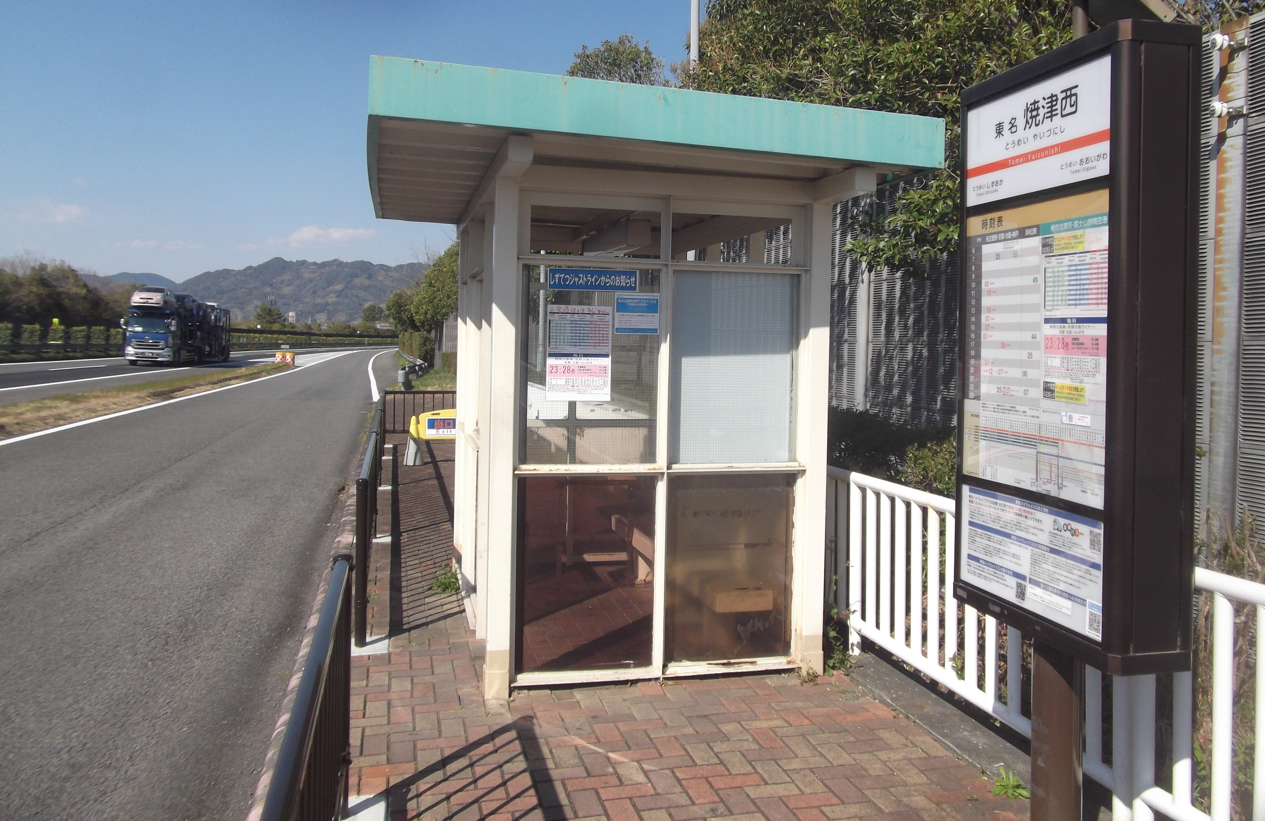 東名焼津西バスストップ下り線